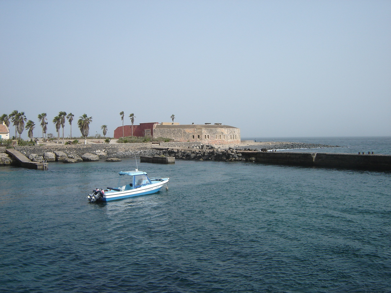 ile de goree fort, now museum (Musée historique du Sénégal)